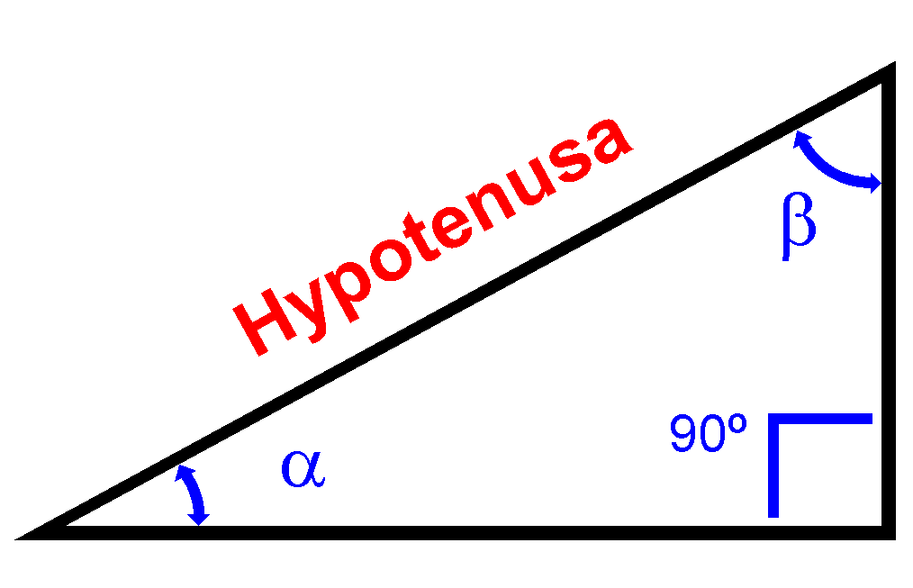 Hypotenusa bij een driehoek. Eigen werk.